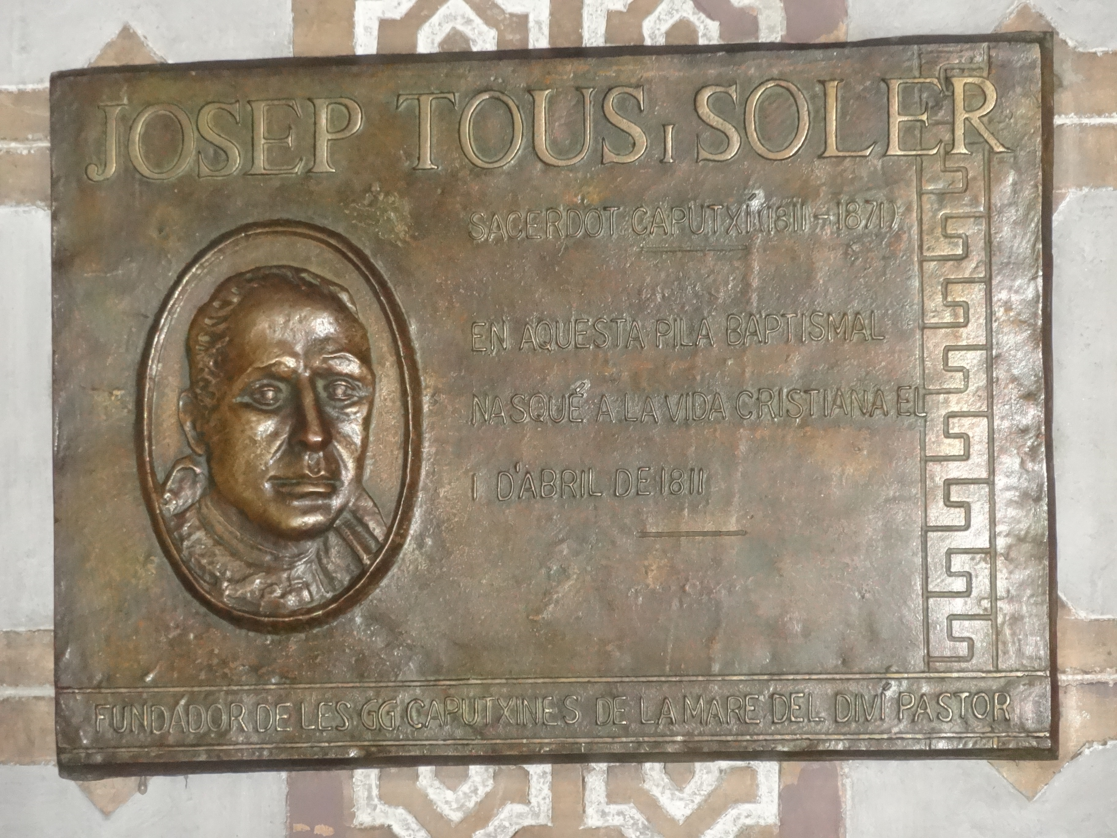 Basílica de Santa Maria, a Igualada. Placa que recorda el baptisme de Josep Tous i Soler el 1 d'abril de 1811.